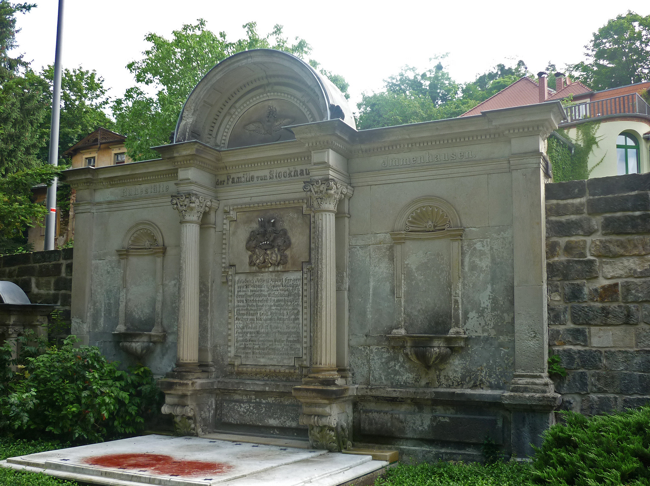 Loschwitzer Friedhof in Dresden-Loschwitz: Familiengruft Stockhausen–Immenhausen (bemerkenswertes Denkmal)